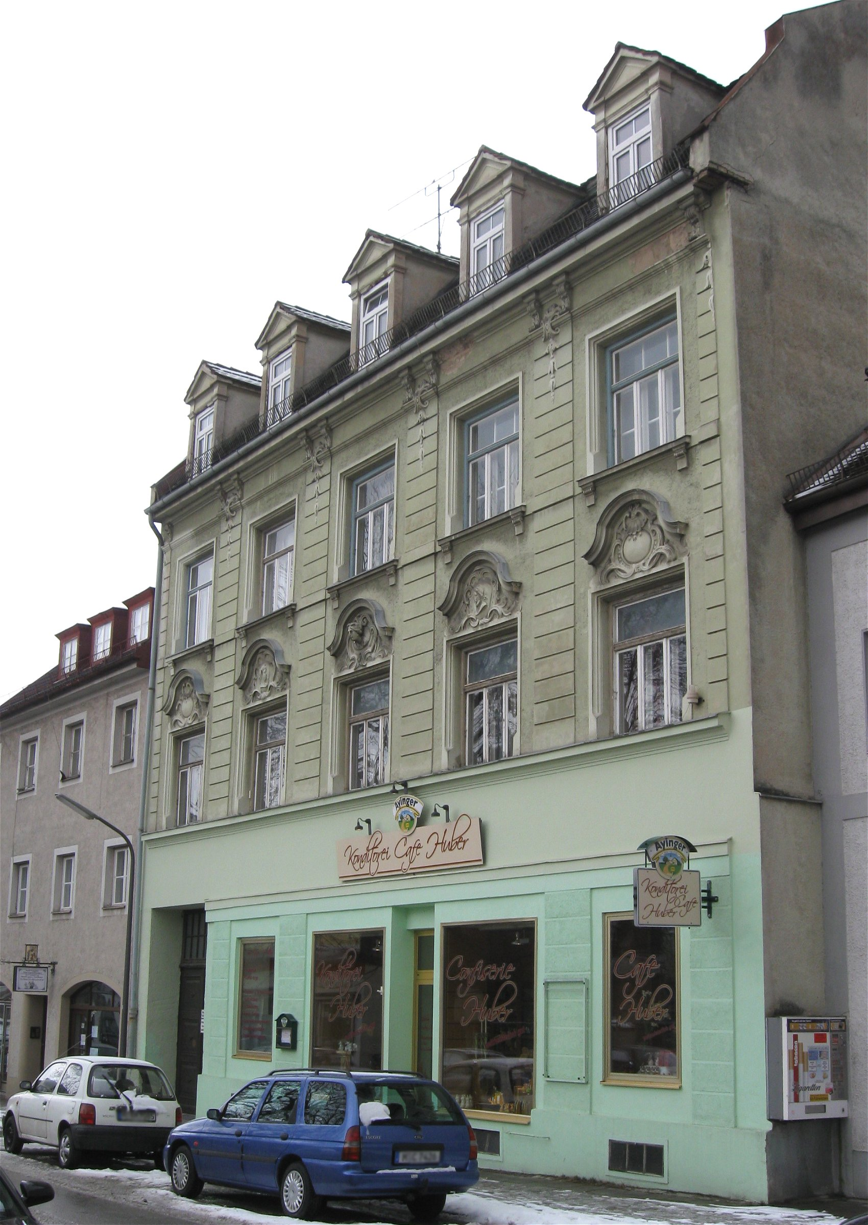 Aribonenstraße 14; Mietshaus, neurokoko, dreigeschossig, um 1900